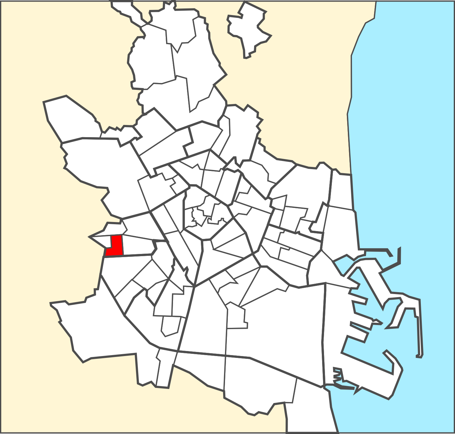 Localització del barri dins de la ciutat de València.